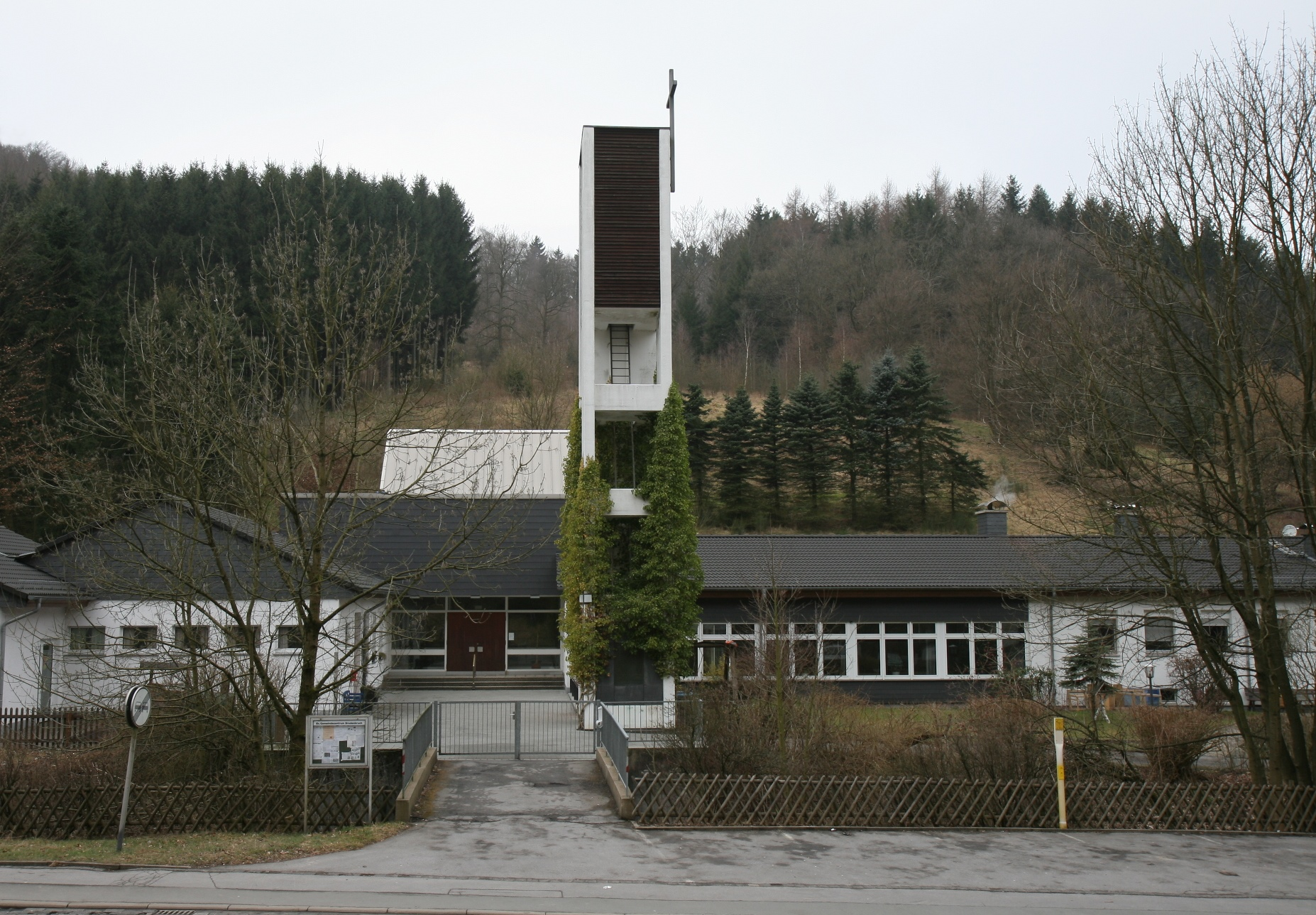 Evangelisches Gemeindezentrum Bredenbruch (erbaut 1967) in Hemer-Bredenbruch.